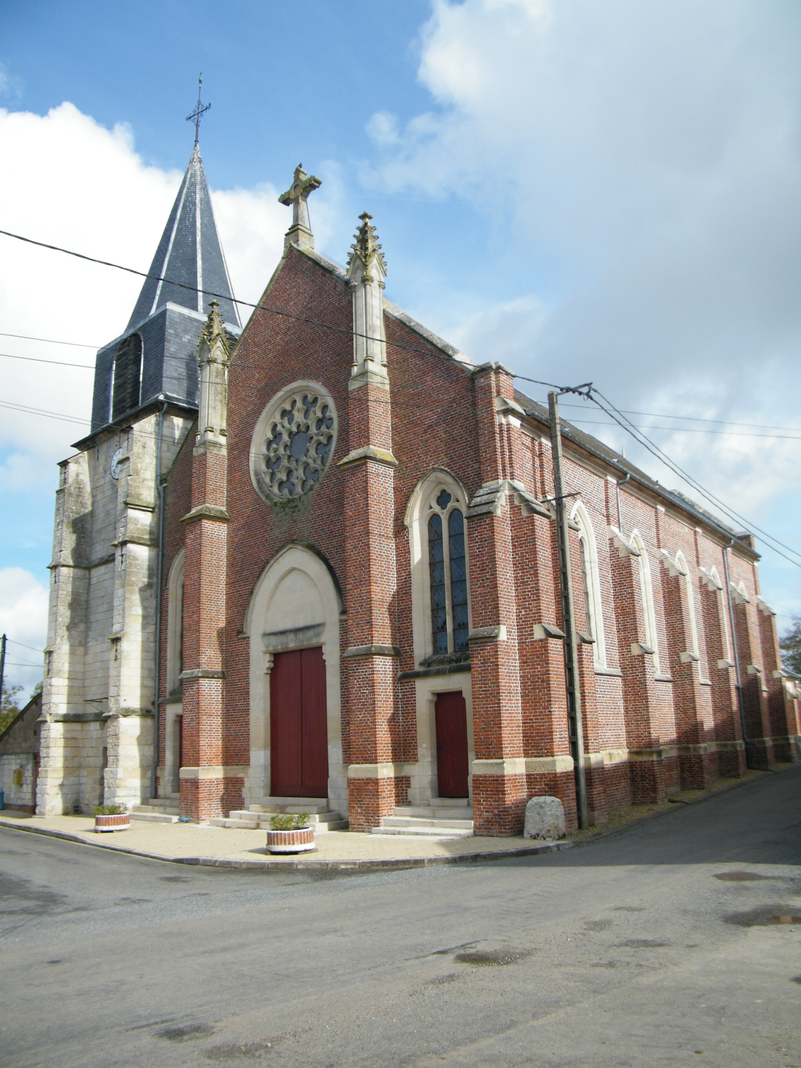 église.